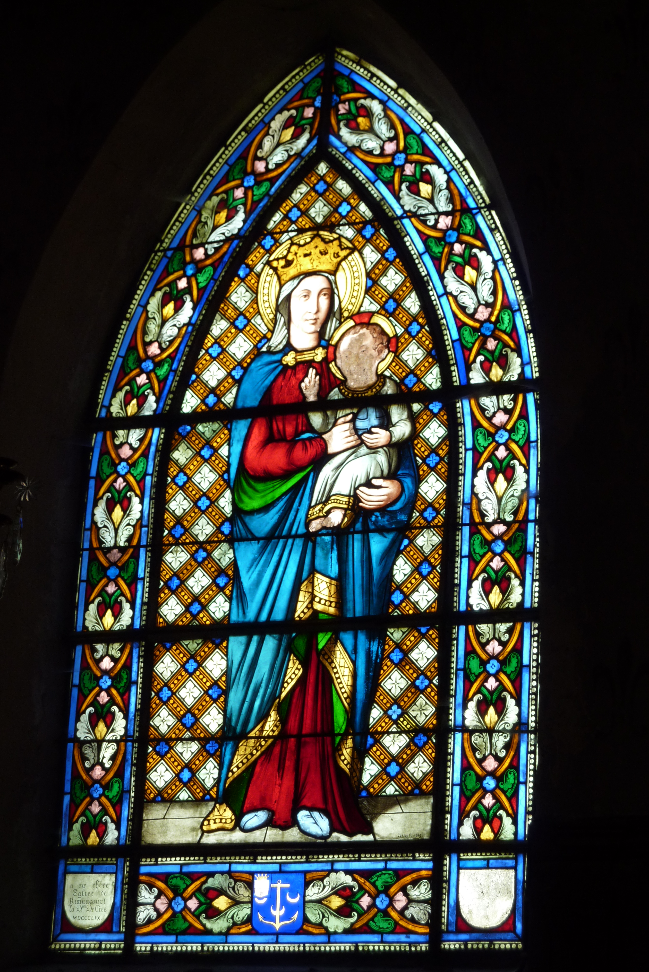 Glasfenster in der Kirche Saints-Pierre-et-Paul in Rimaucourt, Darstellung: Madonna mit Kind, Signatur: "CORNUEL 1859?"